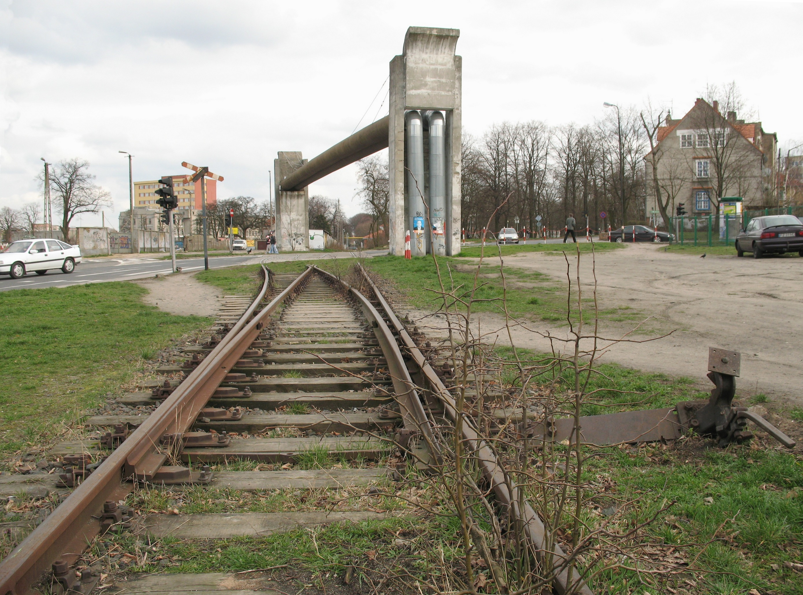 Infrastruktura Kolei Szprotawskiej na terenie Zielonej Góry: Dawny rozjazd przed wjazdem na teren dworca Górne Miasto od strony północnej Autor: Mohylek 14:50, 20 March 2007 (UTC)